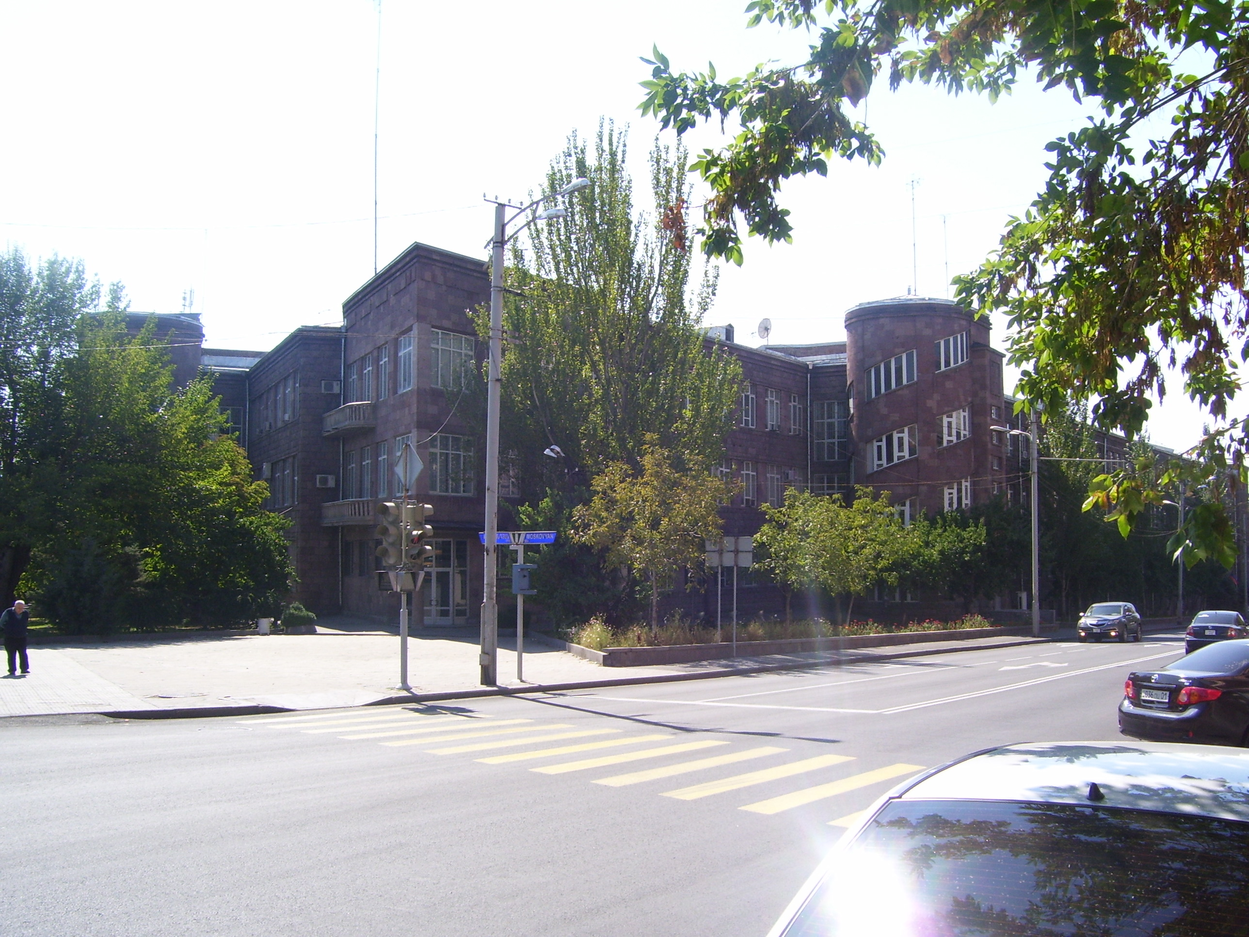 Վարչական շենք ՀՀ Ազգային անվտանգության նախարարության 1936 թ. Նալբանդյան փող. 104, Ճարտ.` Գ. Քոչար 6/165